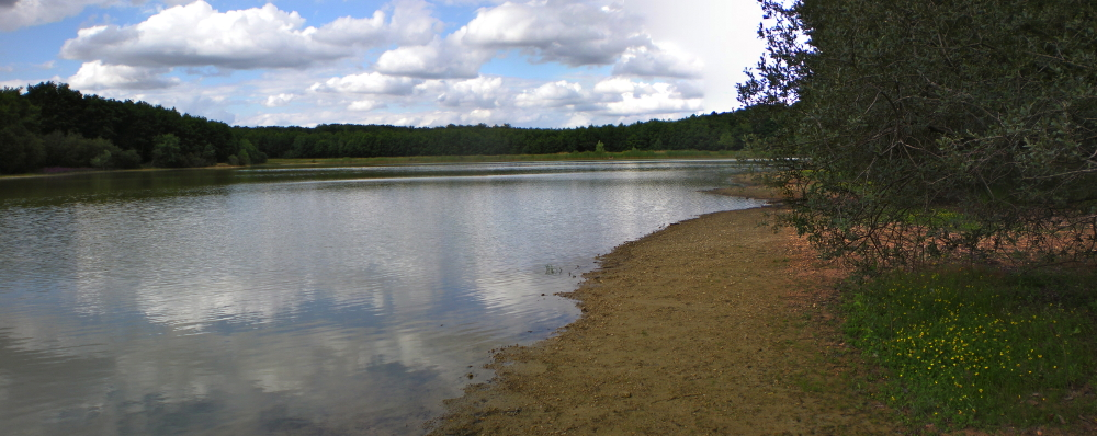 Etang du Pas-aux-ânes